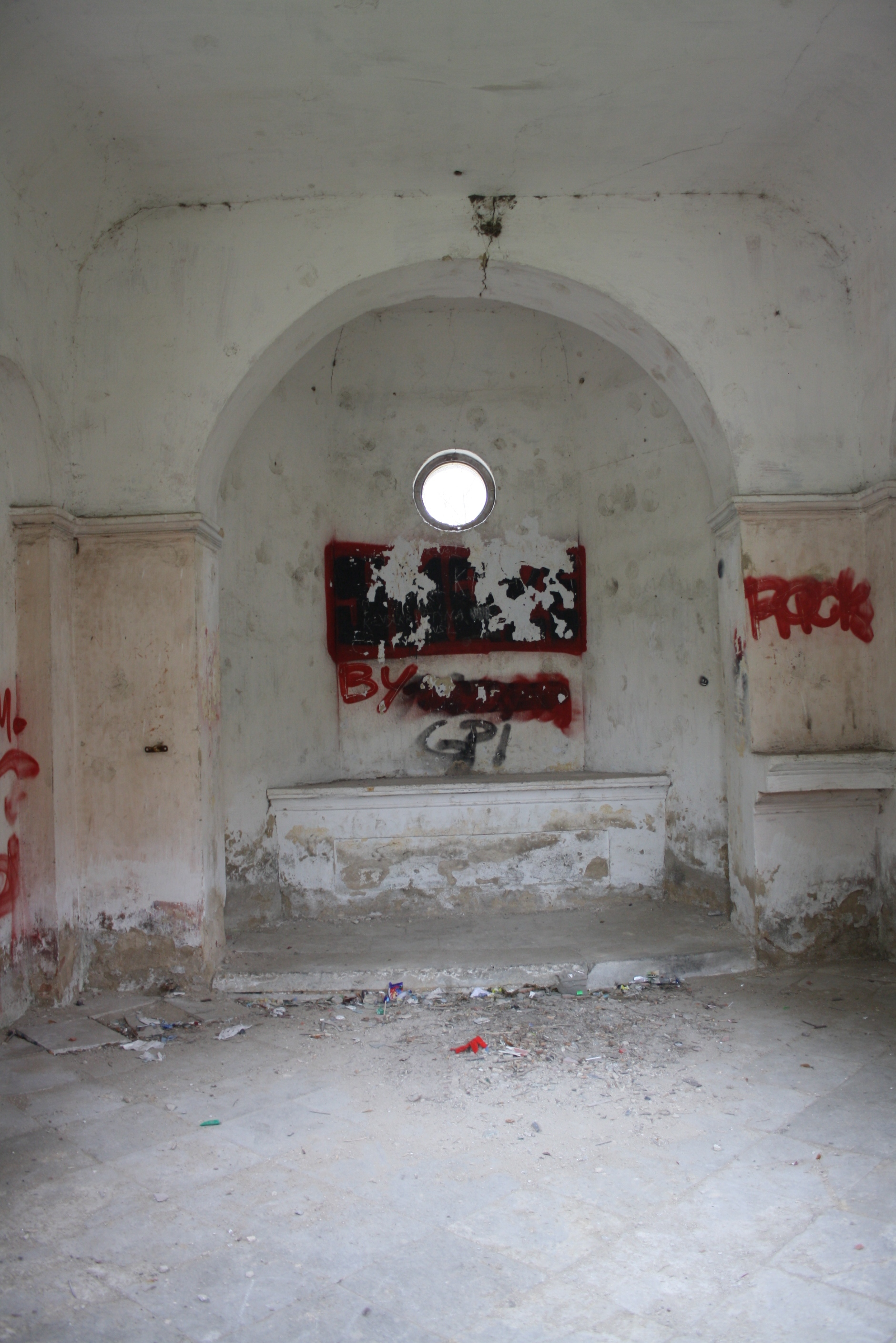 Interiér kapličky Andělů Strážců v Encovanech.